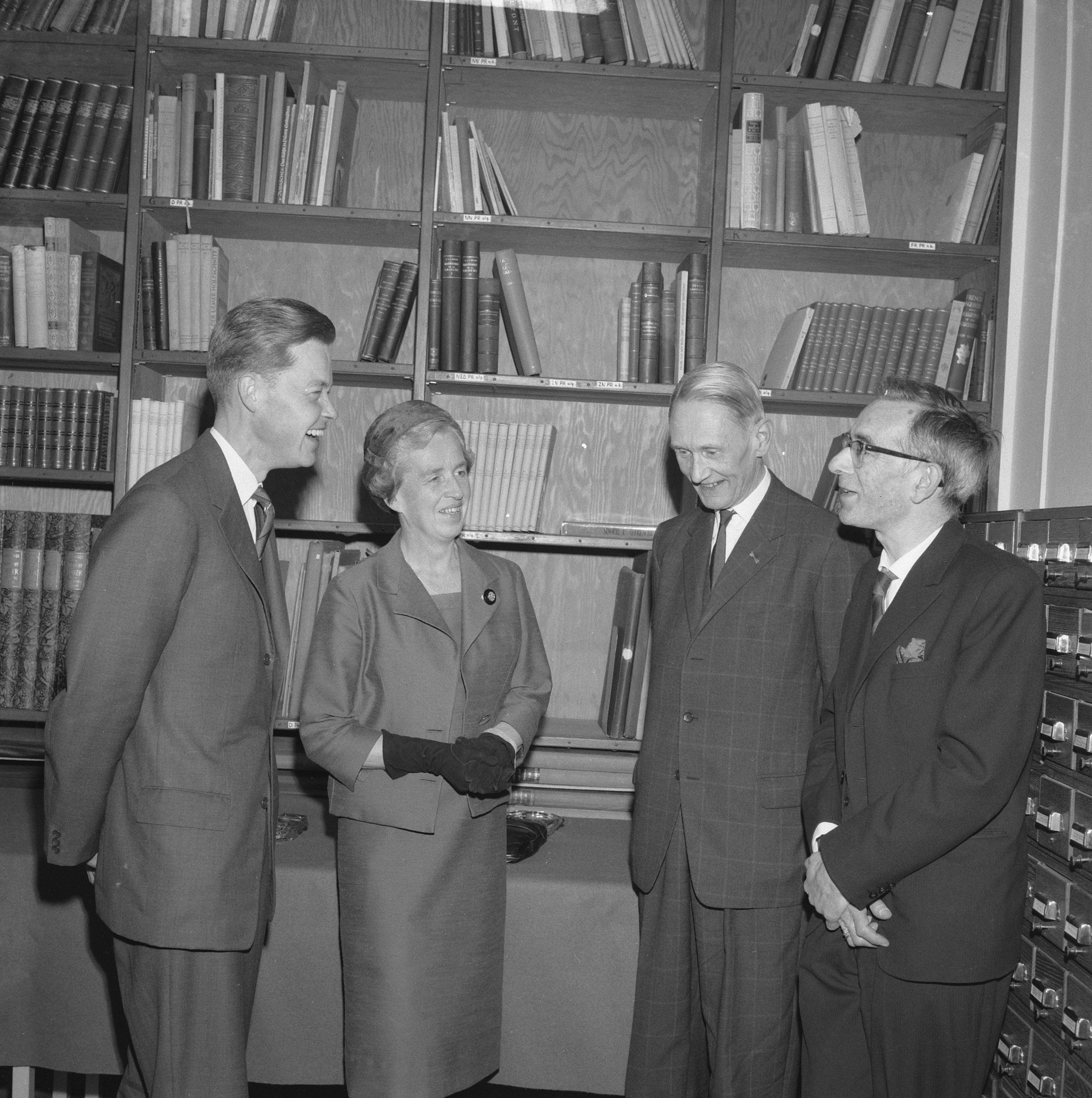 Kunsthistorisch Instituut Amsterdamse Universiteit 1962. V.l.n.r. Josua Bruyn (1923-2011), Emilie Marie Françoise Schokking-Röell (1910-1997), Johan (=Iohan) Quirijn van Regteren Altena (1899-1980), Jan Coenraad Kamerbeek (1907-1998)